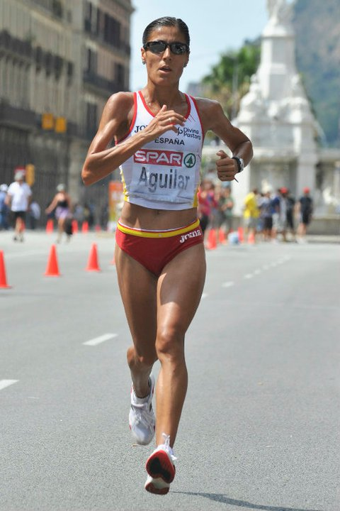 Campeonato de Europa al aire libre en Barcelona (maratón).